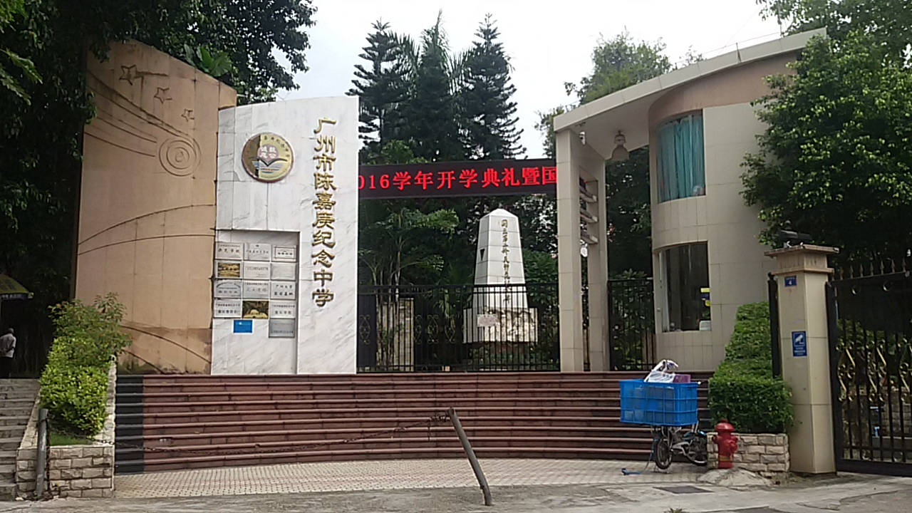 粵語: 陳嘉庚紀念中學大門